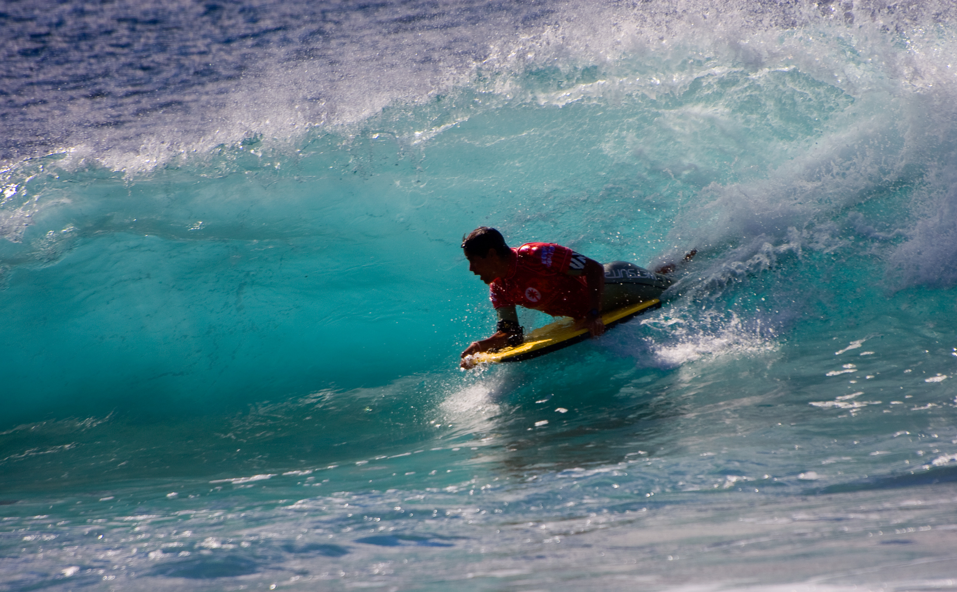 Ver mas fotografias del Campeonato aqui : Comenzó la primera jornada del Campeonato del Mundo de Bodyboard El Confital 2010. Los mejores riders del planeta volverán a deleitar en El Confital. Del 3 al 7 de diciembre, Las Palmas de Gran Canaria acoge por cuarto año consecutivo la última entrega del World Tour de la IBA (International Bodyboarding Association), competición en la que participarán numerosos campeones del mundo de la especialidad. Tras tres exitosas ediciones, la prueba grancanaria toma en esta ocasión un cariz si cabe más relevante, toda vez que en ella se decidirá quiénes son los 24 bugueros que formarán parte del nuevo circuito que la IBA implantará a partir de la próxima temporada, el Top 24 GSS (Grand Slam Series), y que el director del IBA Tour, Terry McKenna, ha señalado como "el momento definitivo que el mundo del bodyboard estaba esperando". El Top 24 GSS será el mejor circuito que jamás se haya disputado dentro del bodyboard, con grandes privilegios mediáticos y publicitarios para los deportistas que lo conformen. Y todo se decidirá, sobre la mejor derecha de Europa, en la bahía de El Confital, donde además de Diego Cabrera y Yeray Martínez (actuales números 5 y 15 del ranking mundial), los canarios Guillermo Cobo, Airam Cabrera, Ardiel Jiménez u Óliver Herrera cuentan con serias opciones de entrar en ese histórico Top 24 si cuajan una buena actuación en El Confital. Más información en